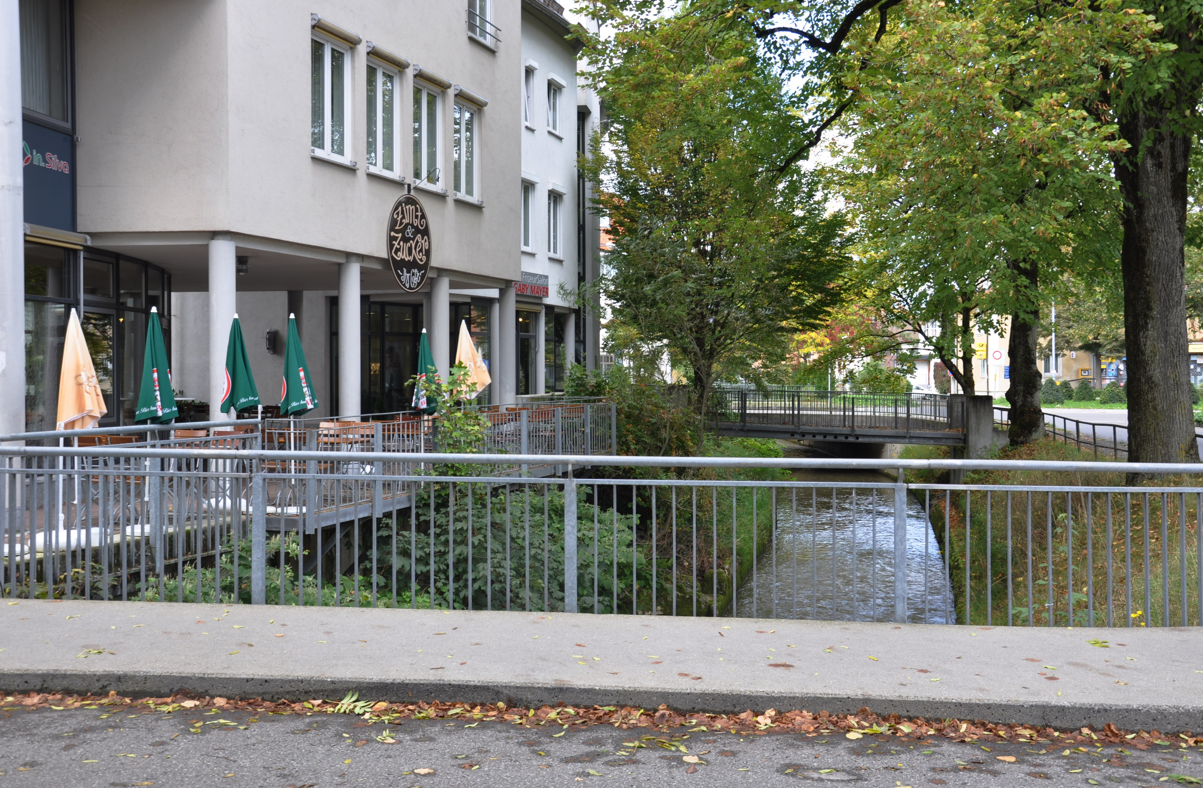 Leutkirch, Brücken über die Eschach und Terrasse des Cafés Zimt & Zucker, Lindenstraße 6